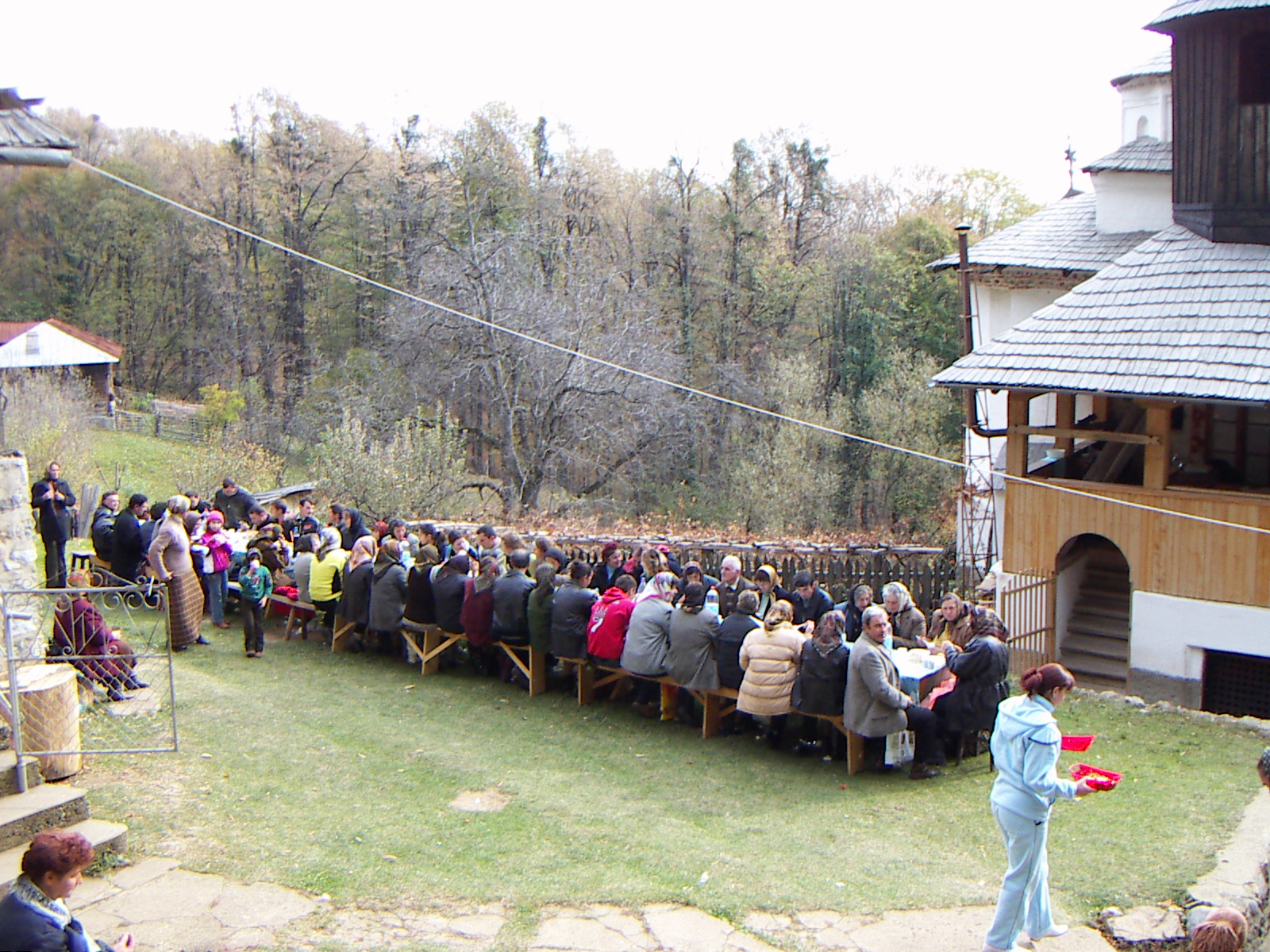 Ansamblul schitului Cioclovina de Jos, construit în anul 1715, aparţinând de Mânăstirea Tismana, oraşul Tismana, Gorj